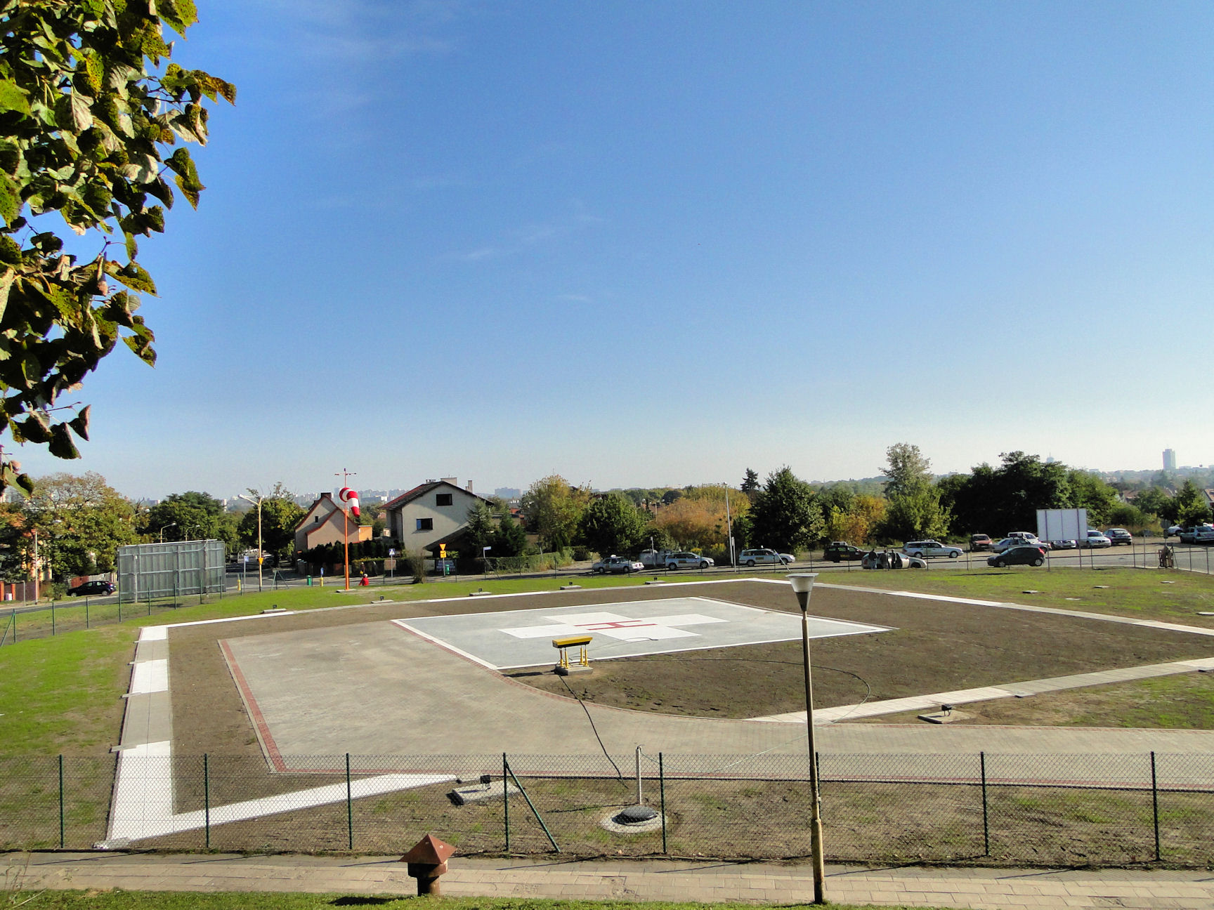 Wybudowane w 2010 r., całodobowe lądowisko dla helikopterów przy Szpitalu Klinicznym nr 1 przy ul. Unii Lubelskiej w Szczecinie.